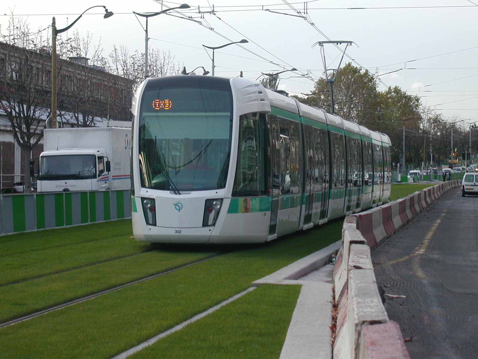 Le premier test du nouveau tramway T3 de Paris